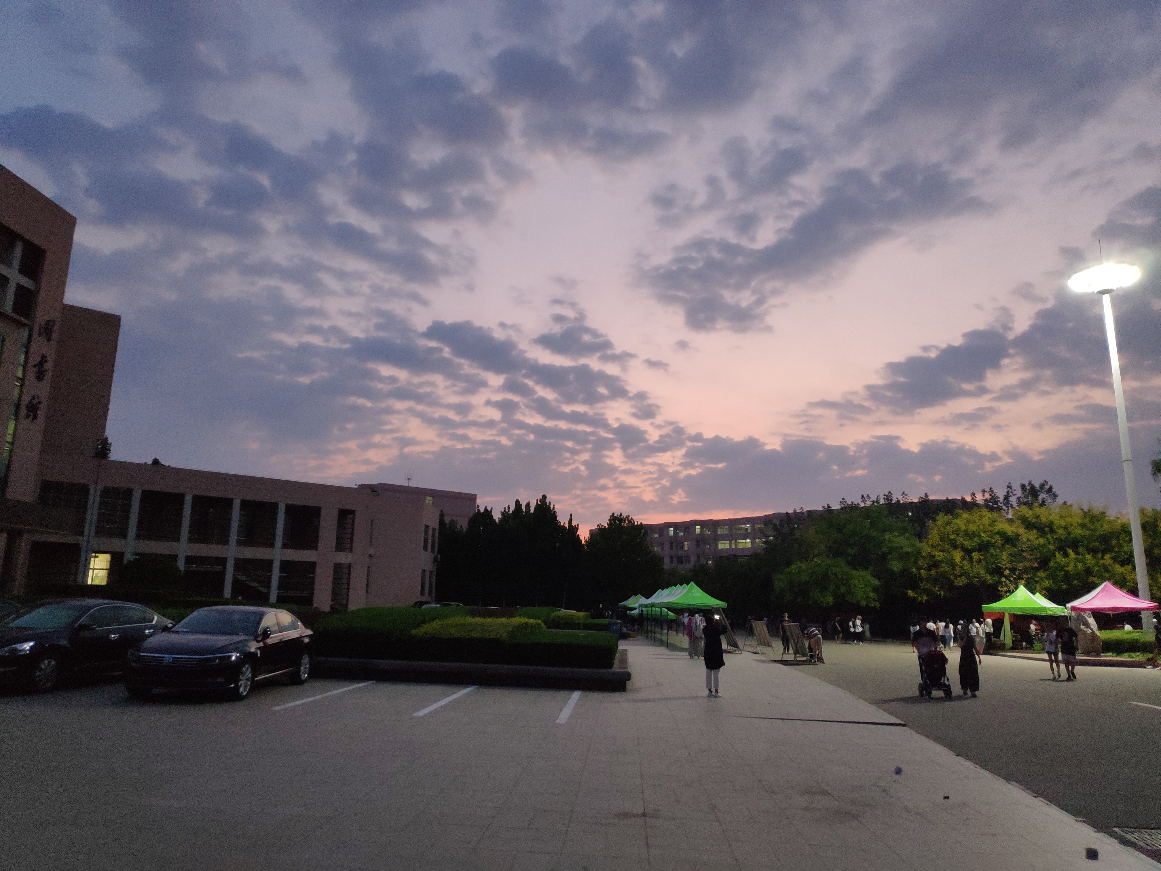 潍坊学院图书馆以北 北门以南